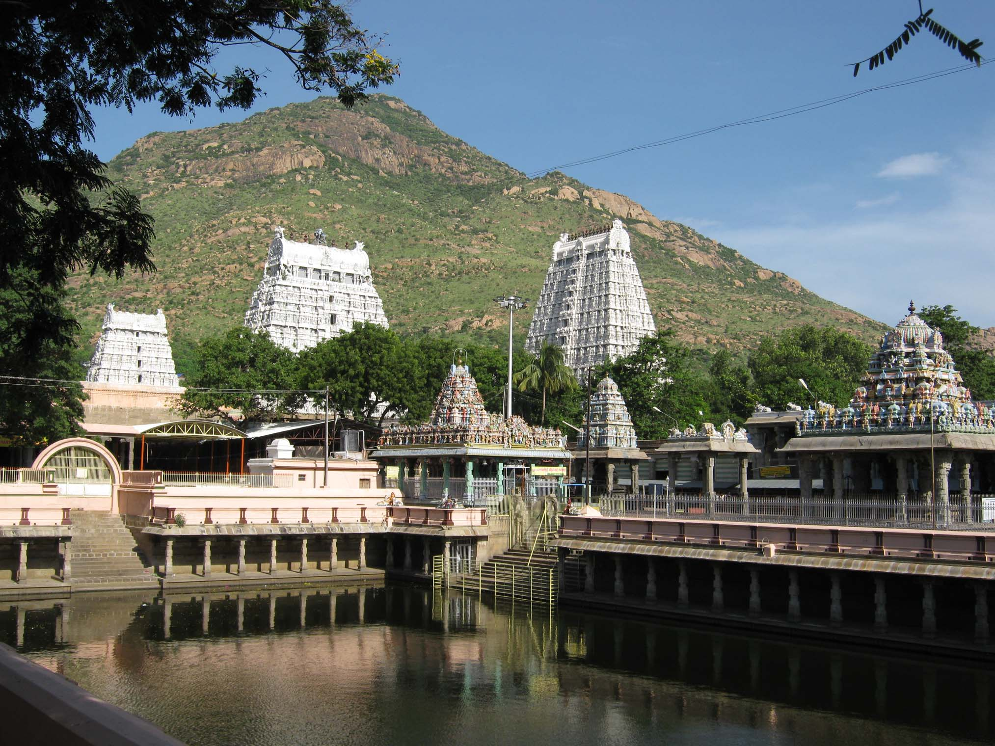 Tiruvannamalai Temple with hill veiw